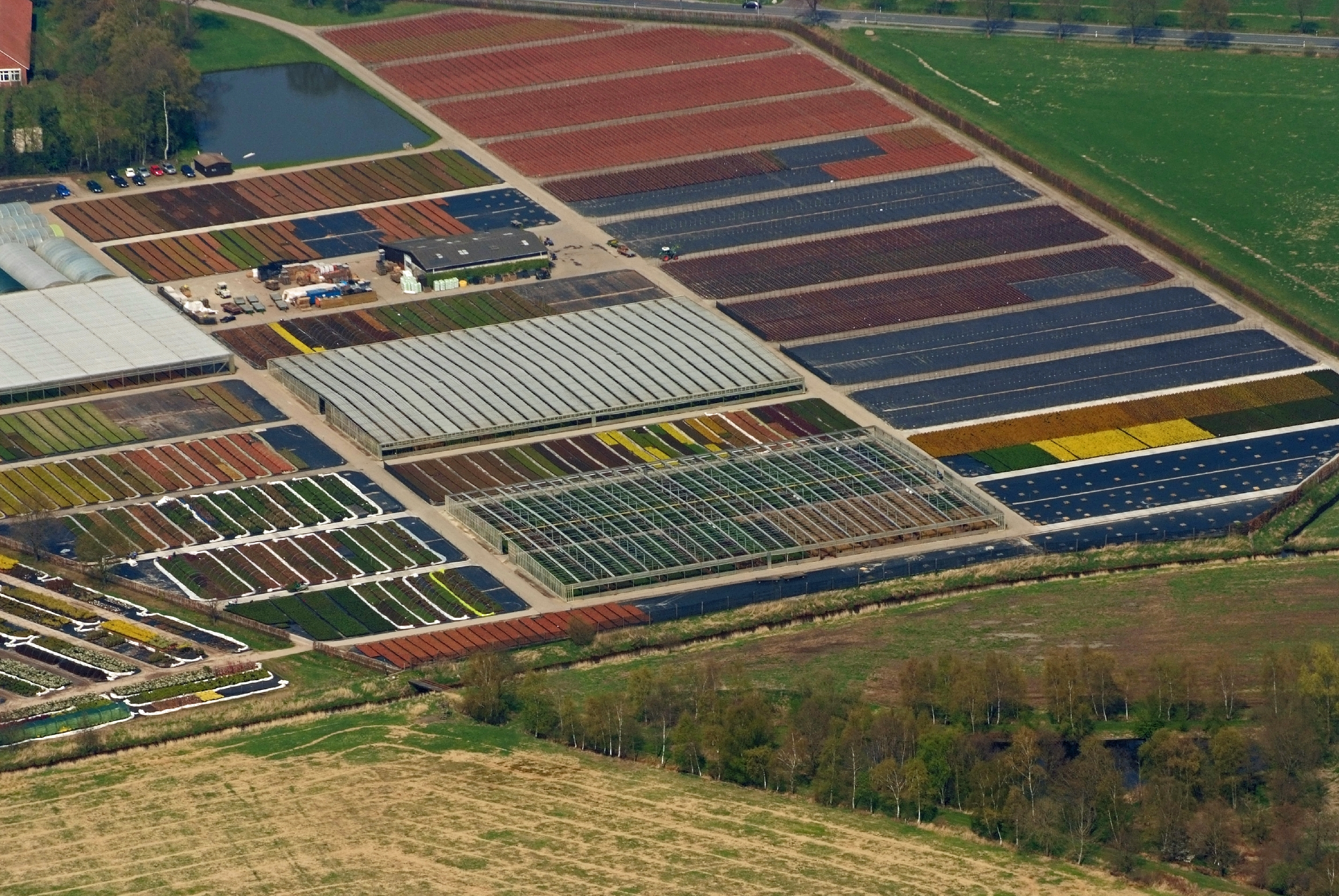 Fotoflug von Nordholz-Spieka nach Oldenburg und Papenburg